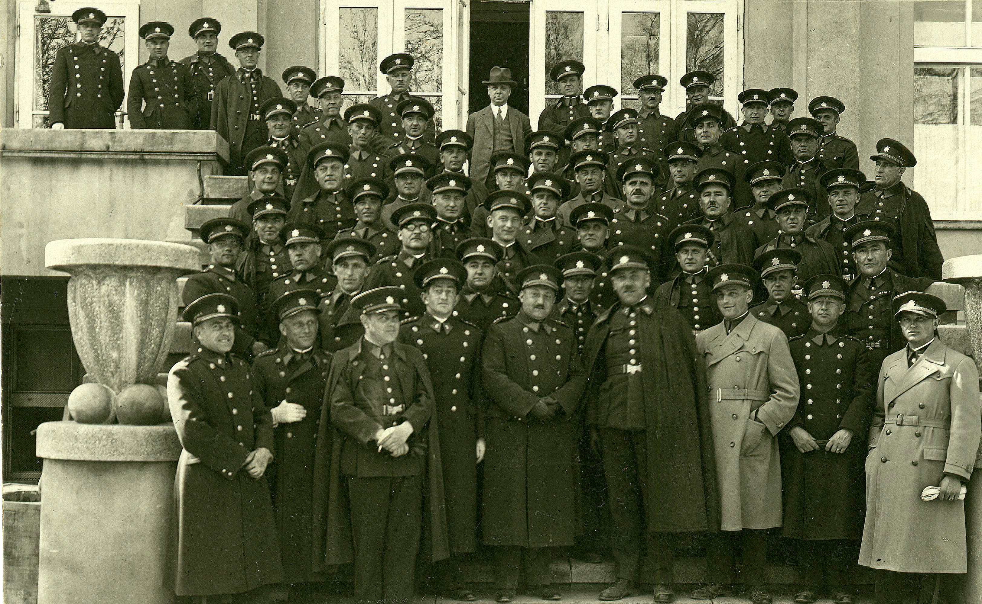 sbor důstojníku akademie Hranice lázně Poděbrady (1934-1936)